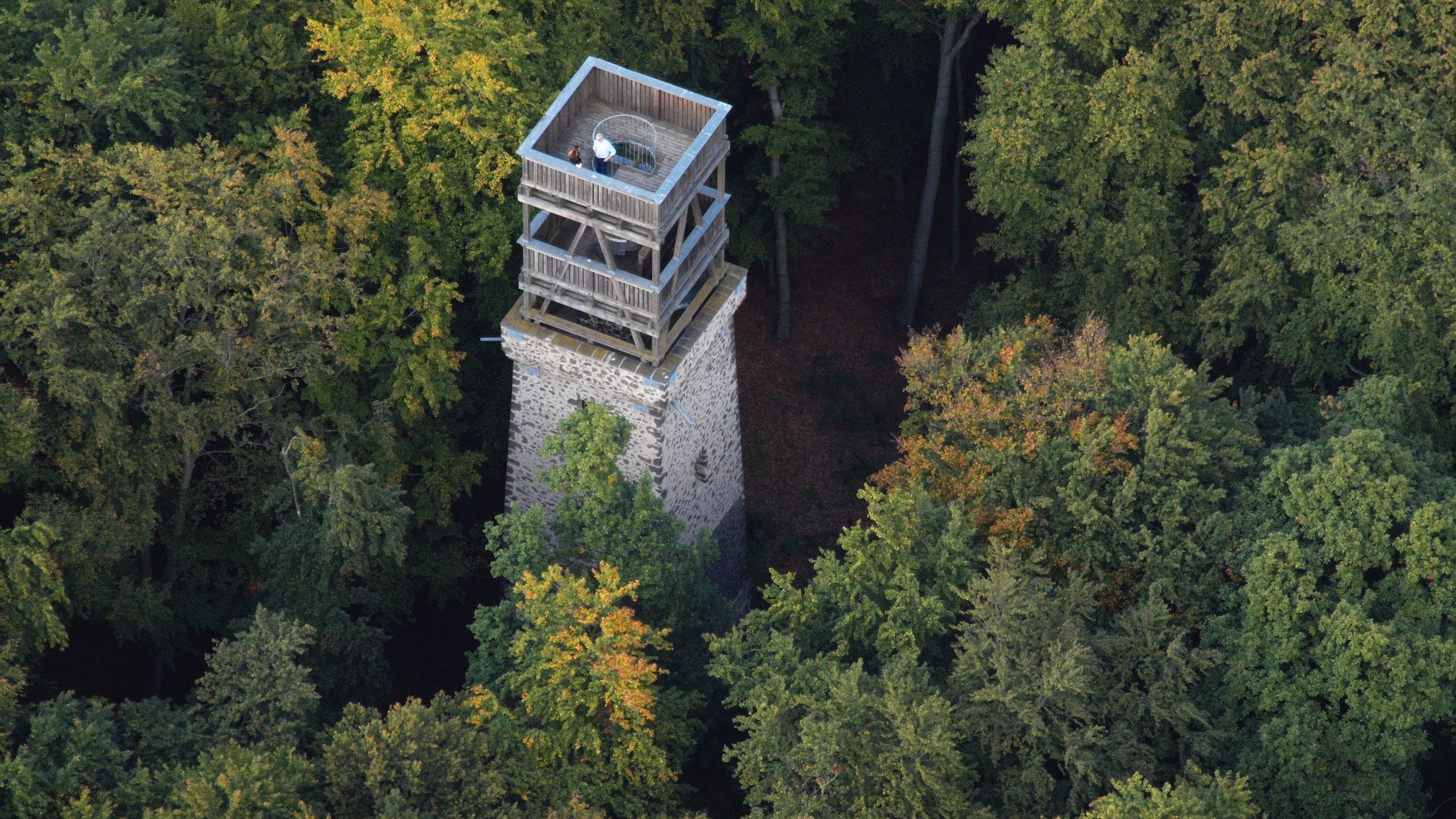 Lydiaturm auf dem Veitskopf nahe dem Laacher See, Luftaufnahme (2014)